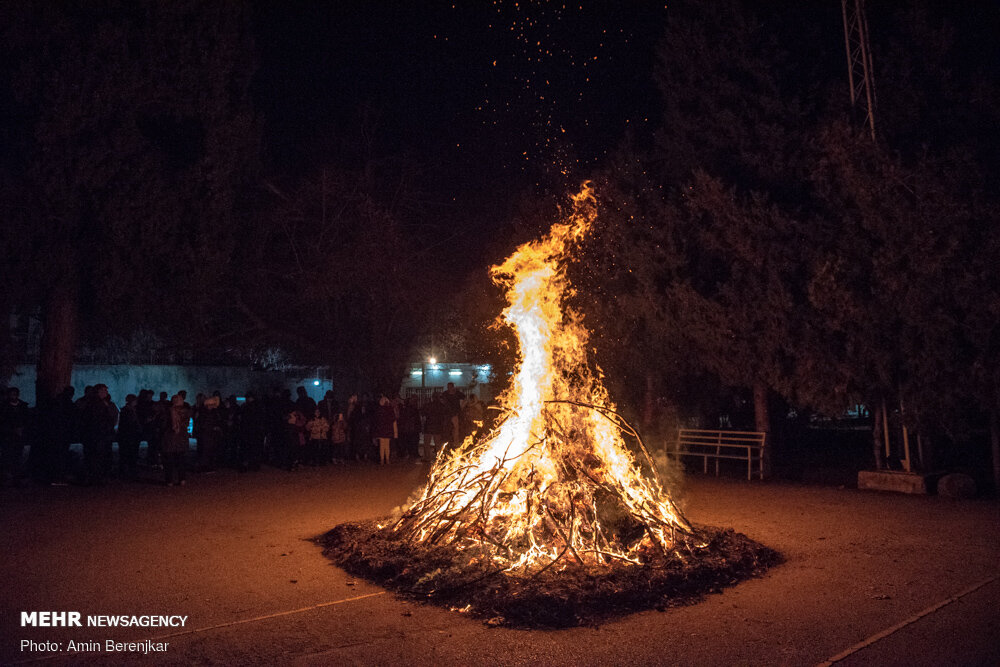 جشن سده در شیراز، ۱۰ بهمن ۱۳۹۸